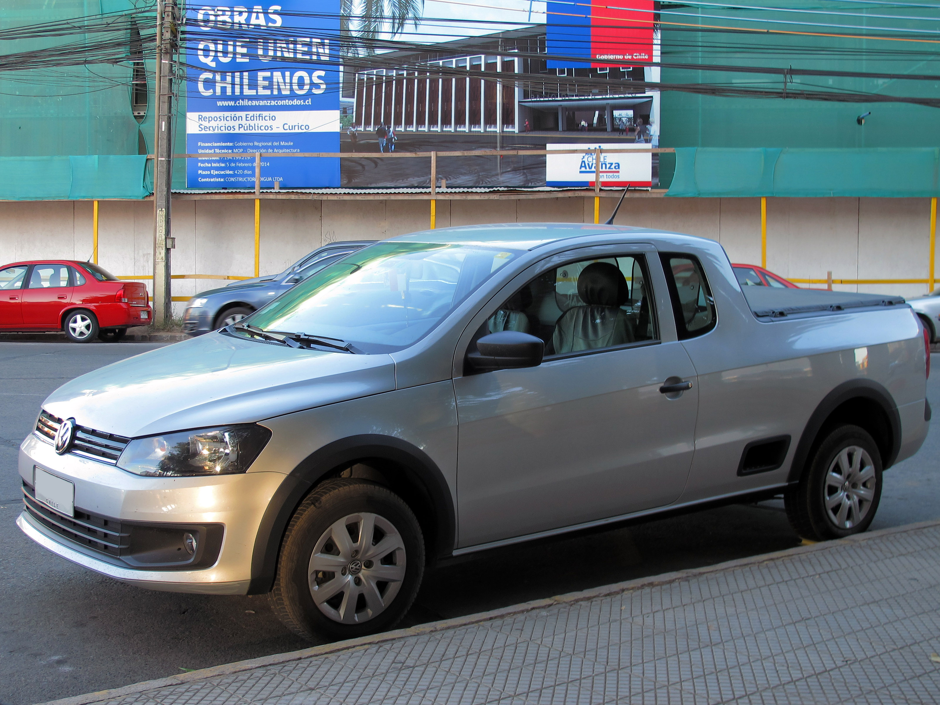 Volkswagen Saveiro 1.6 Power Extended Cab 2014